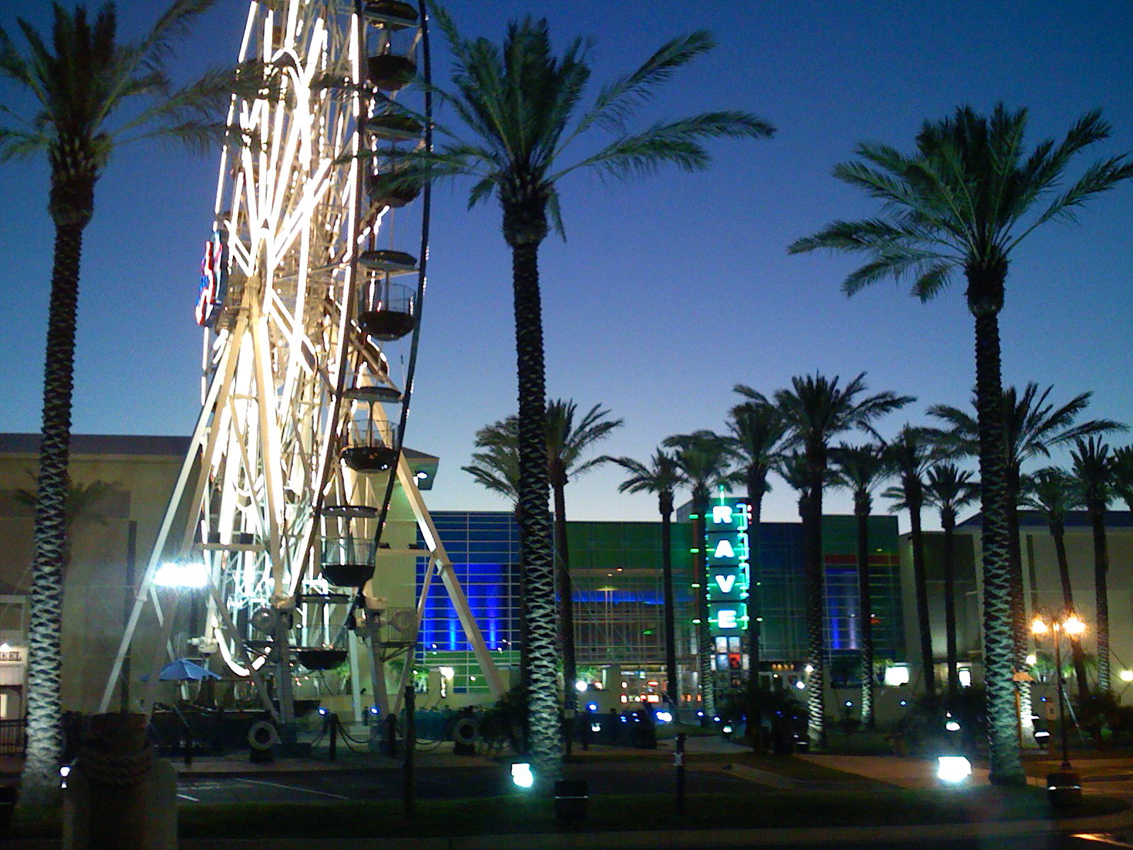 Grande roue de Ferris wheel, Orange Beach AL